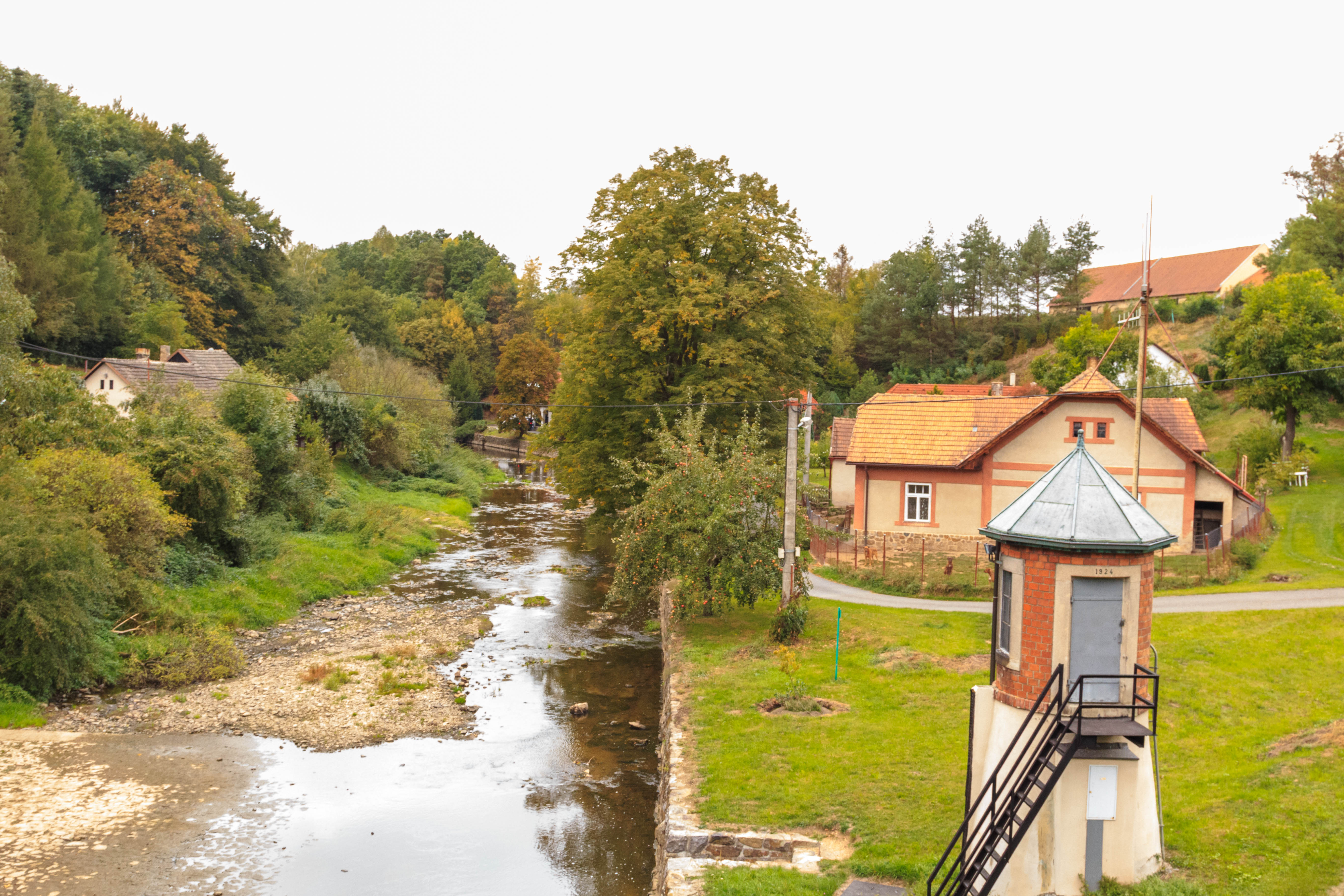 Spačice Doubrava